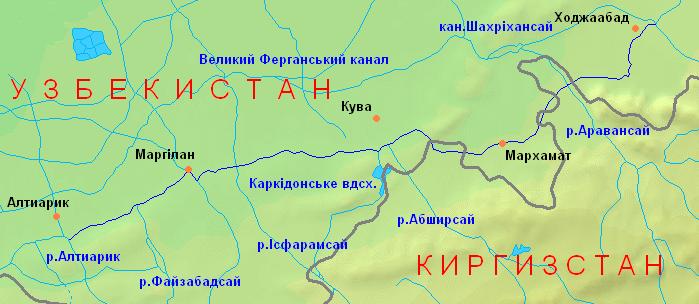 Мапа Південного Ферганського каналу